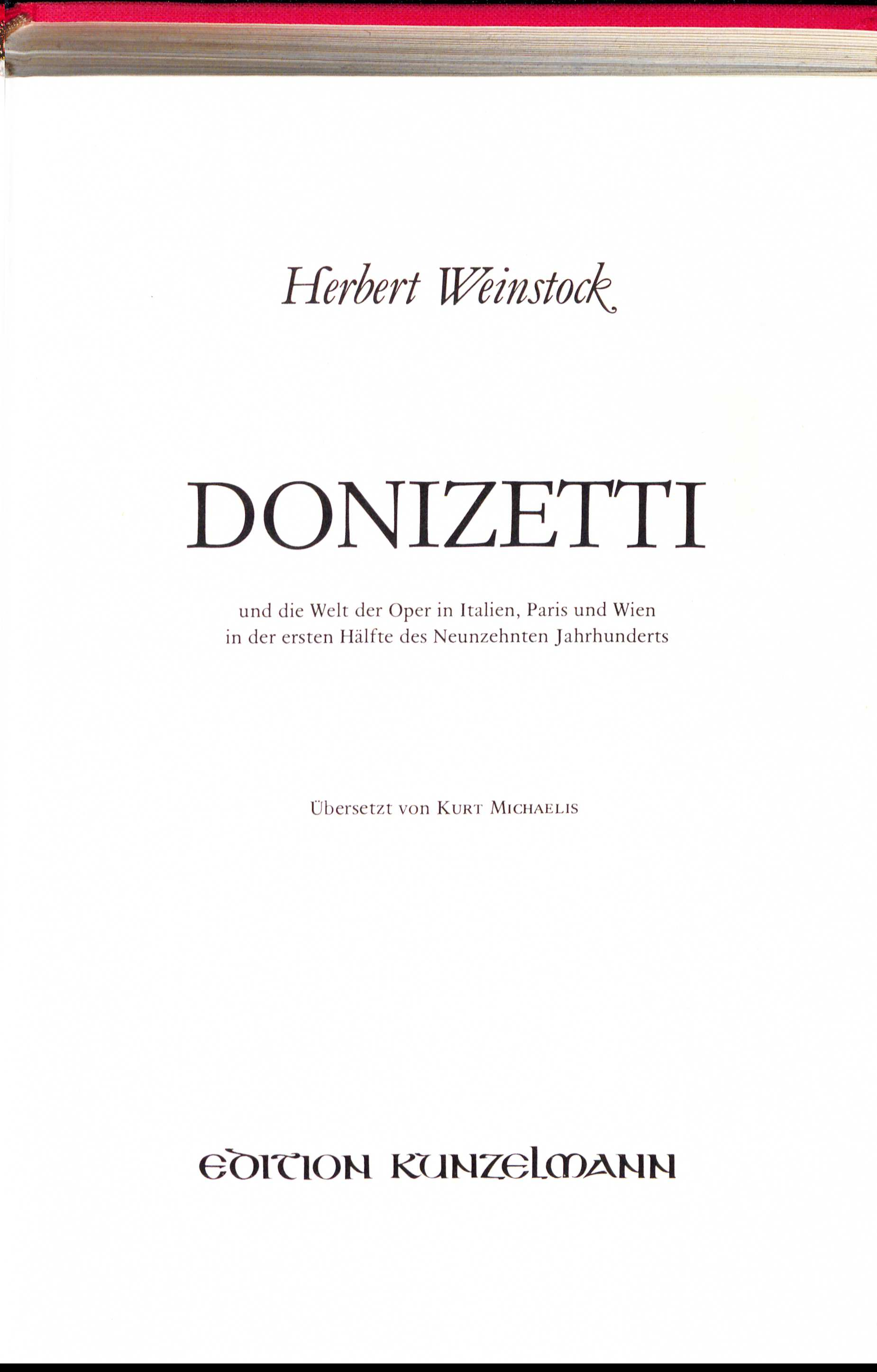 Herbert Weinstock Donizetti und die Welt der Oper in Italien, Paris und Wien in der ersten Hälfte des neunzehnten Jahrhunderts. Übersetzung Kurt Michaelis. Adliswil : Kunzelmann, 1983